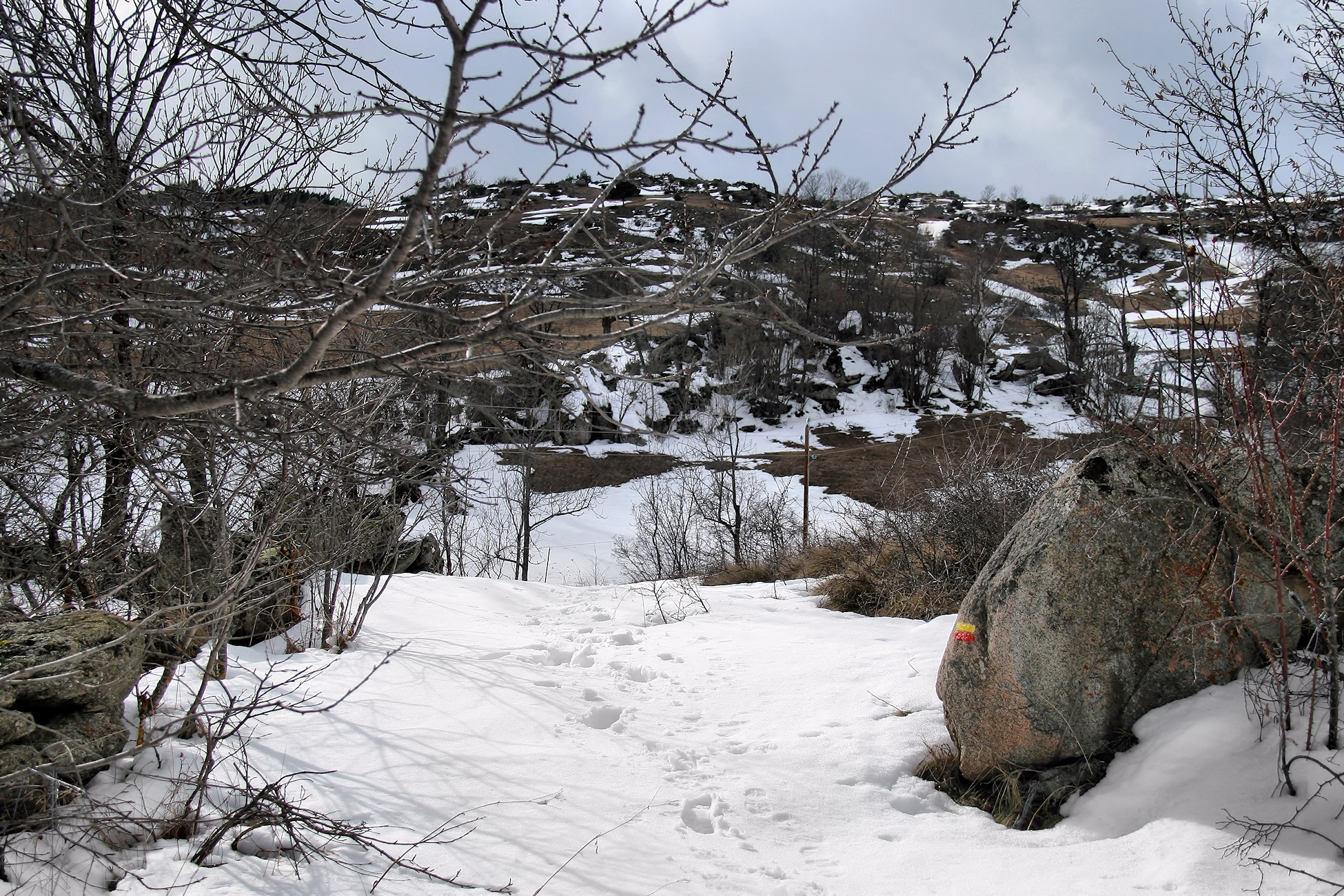 Feners